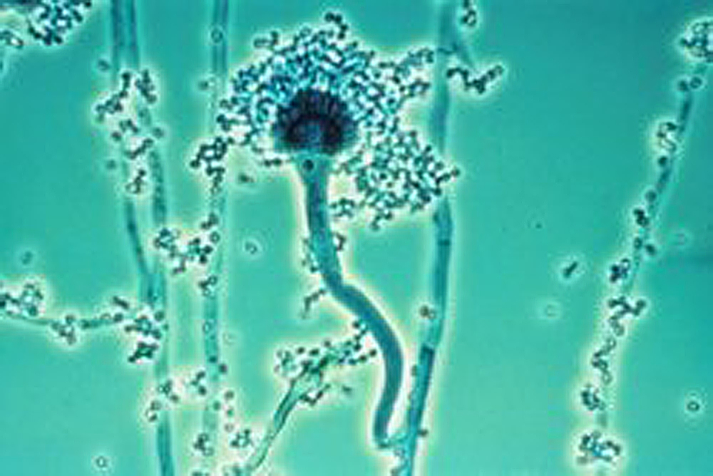 Aspergillus, maybe fumigatus